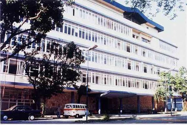 Fachada da ETEAB logo após a inauguração em 1998